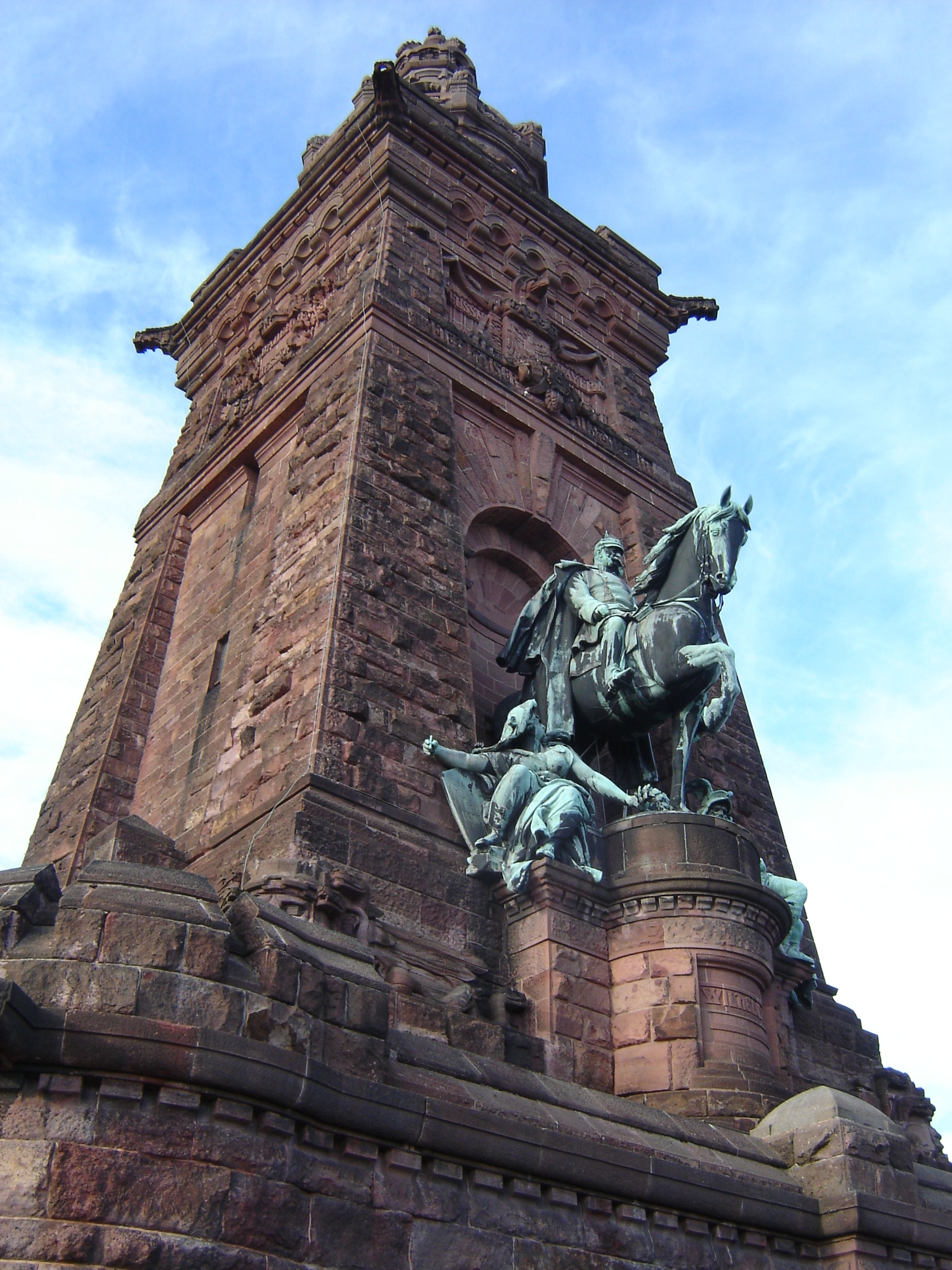 Kyffhäuserdenkmal, Thüringen - Kaiser Wilhelm I